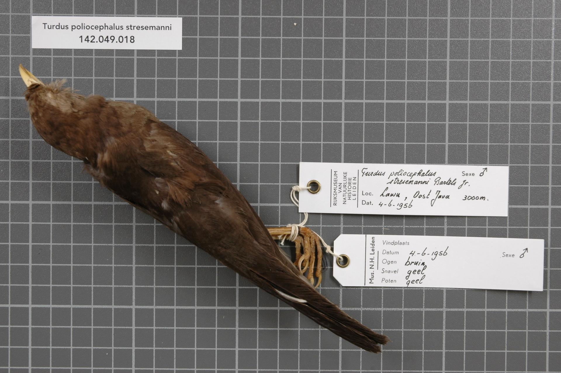 Turdus poliocephalus stresemanni Bartels, 1938